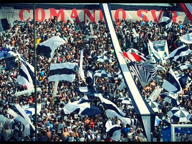 Hinchada de Universitario